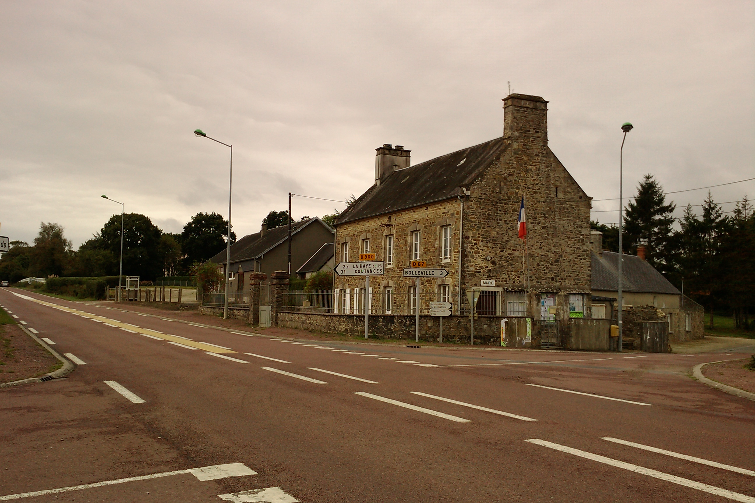 Neufmesnil